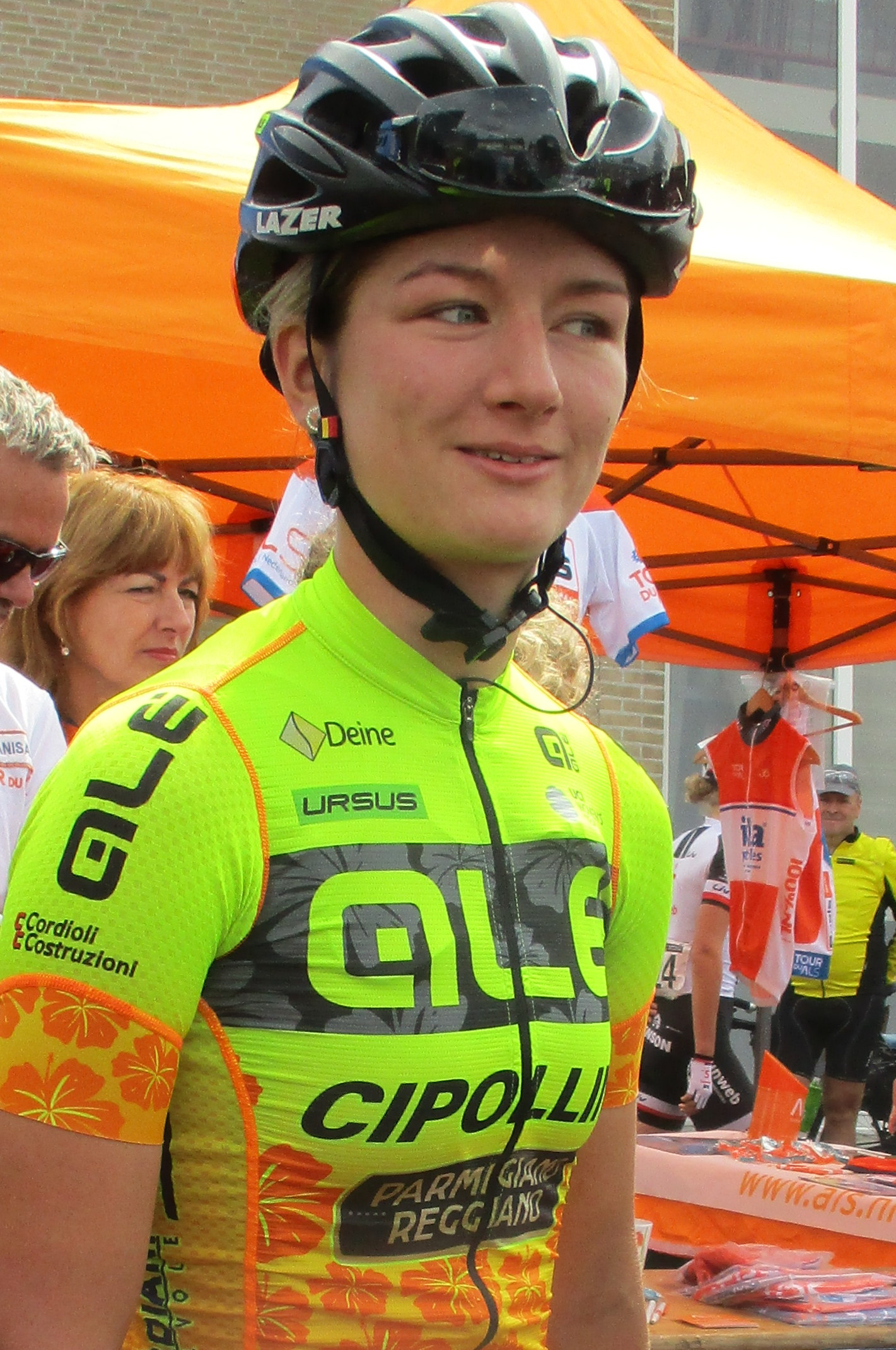 4e etappe van de Boels Ladies Tour 2018 door Noord-Limburg, start in Stramproy.